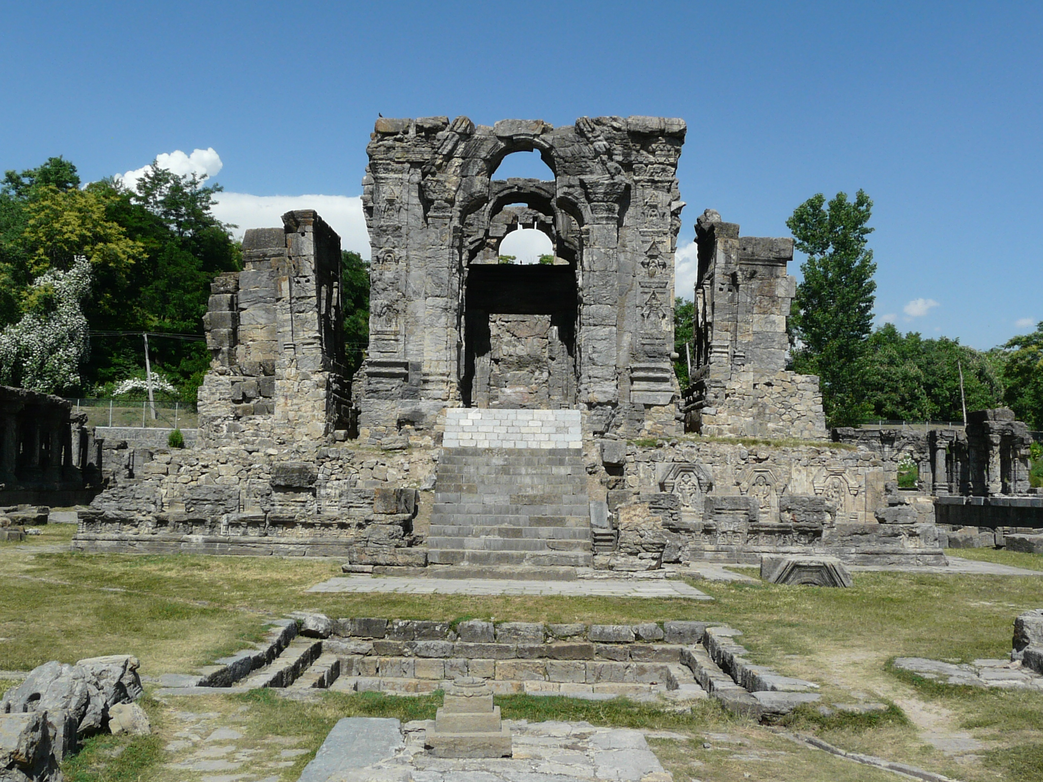 Surya temple Sun Temple, Martand, Jammu and Kashmir, India